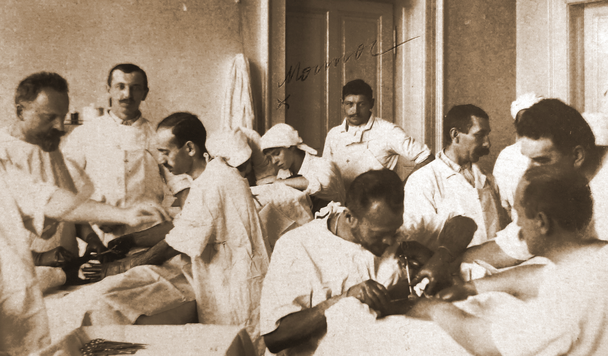 Dora Patzelt während des Studiums im Seziersaal 1915